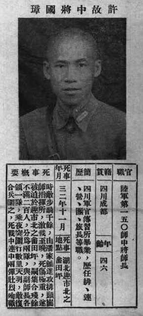 抗戰軍人忠烈錄第一輯中的烈士遺像